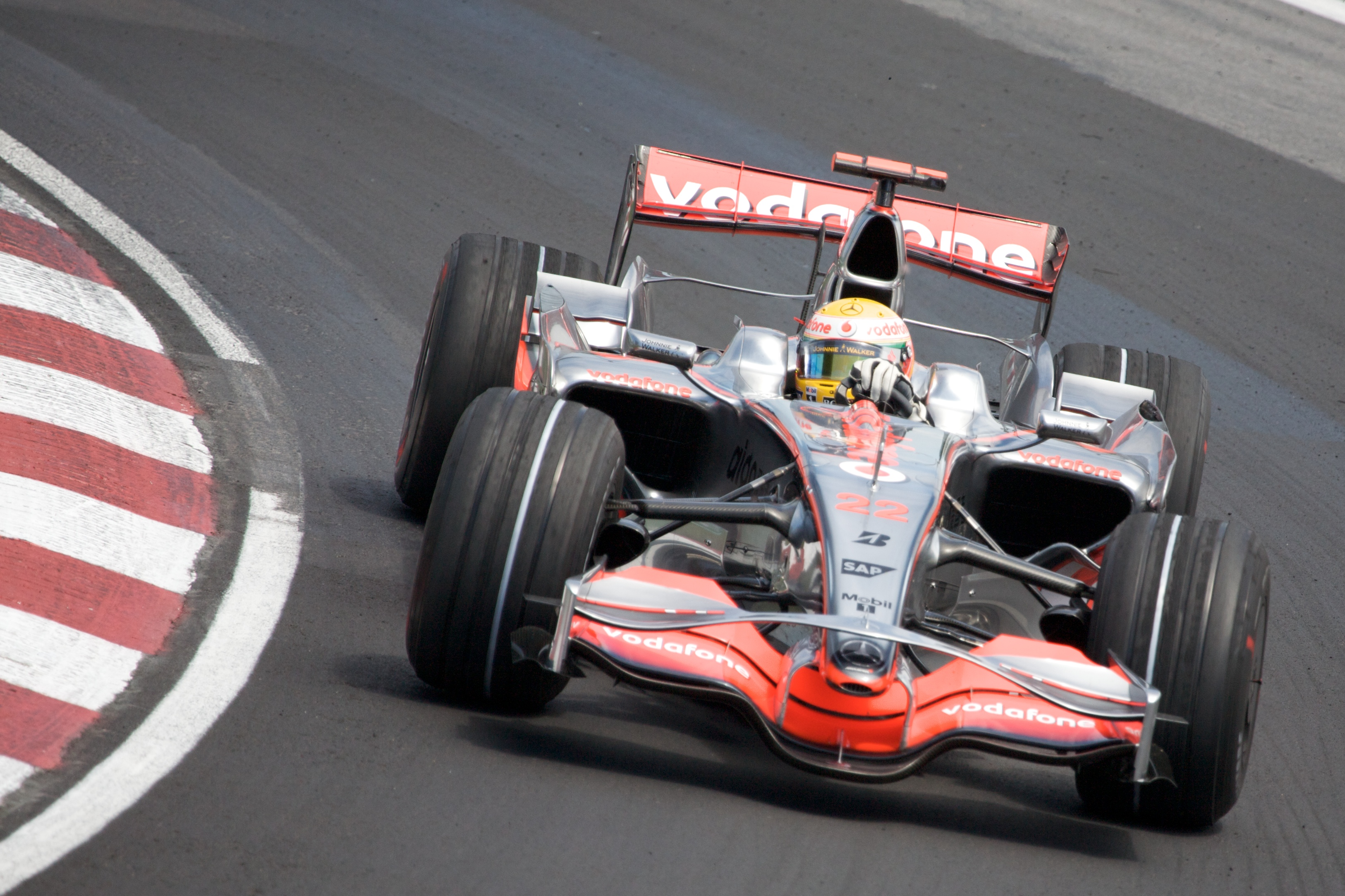 Hamilton at Canada 2008